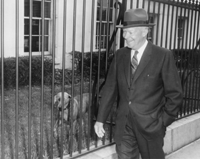 President Eisenhower with his dog Heidi after a press conference a the White House